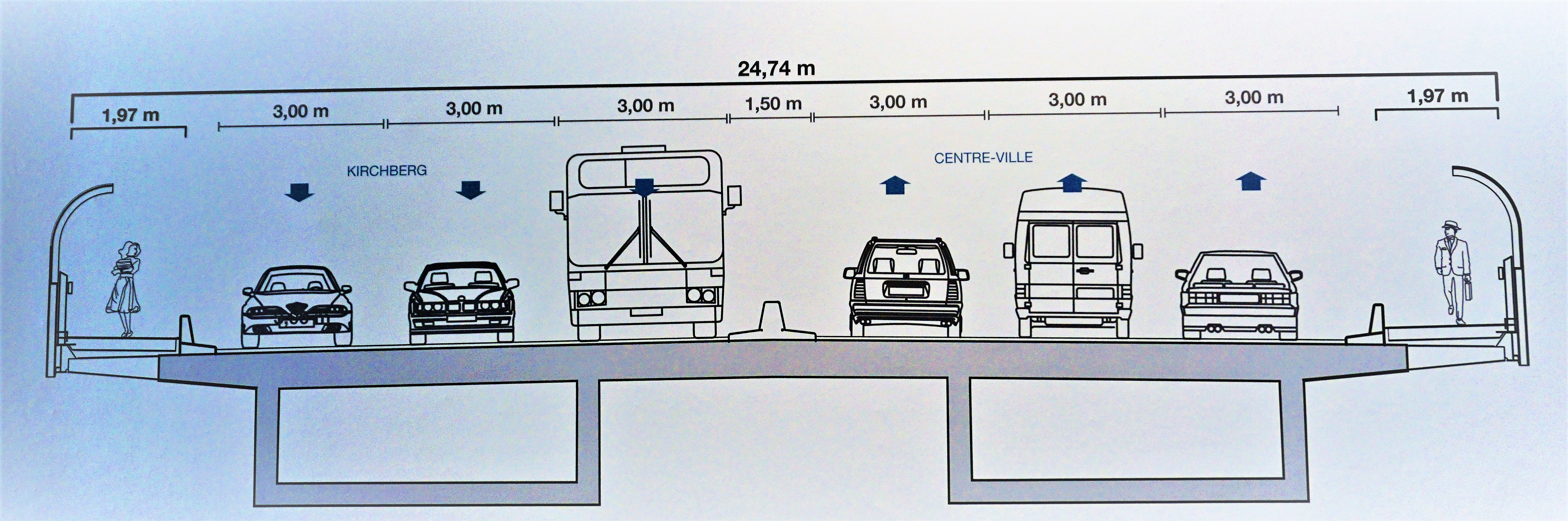 Le Pont Grande-Duchese Charlotte. Coupe avant les travaux de rénovation (2015-2017).